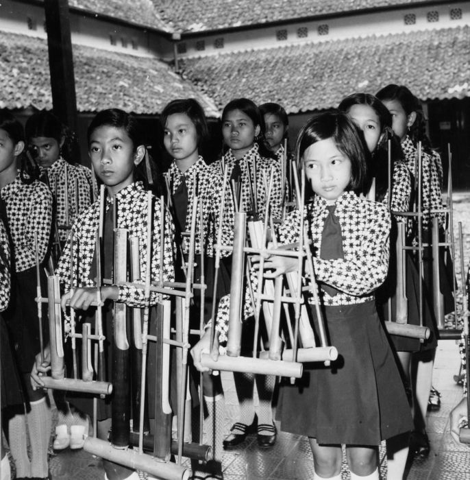 Negatief. Schoolkinderen in het angklung-orkest